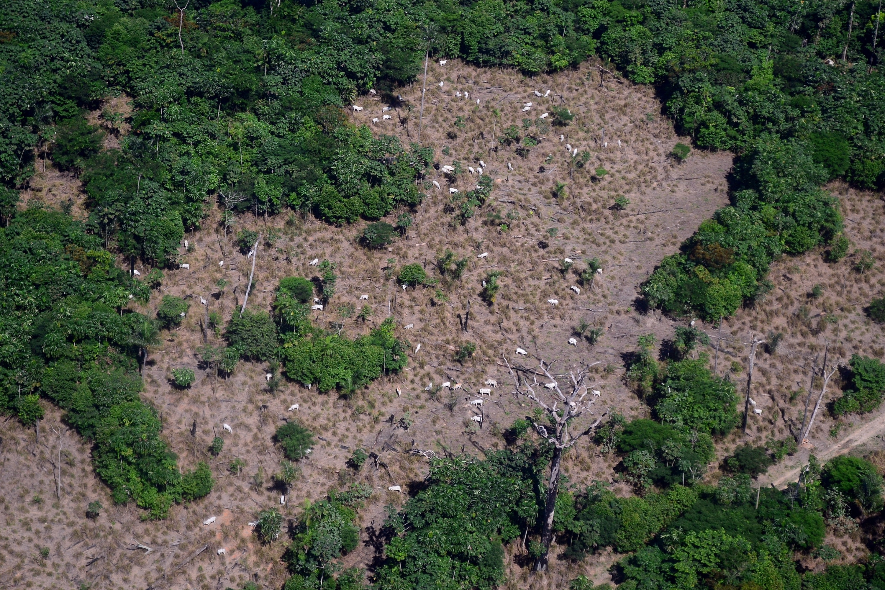 Rebanho bovino pasta próximo às áreas de floresta em Novo Progresso, Pará. Foto: Vinícius Mendonça - Ascom/Ibama.